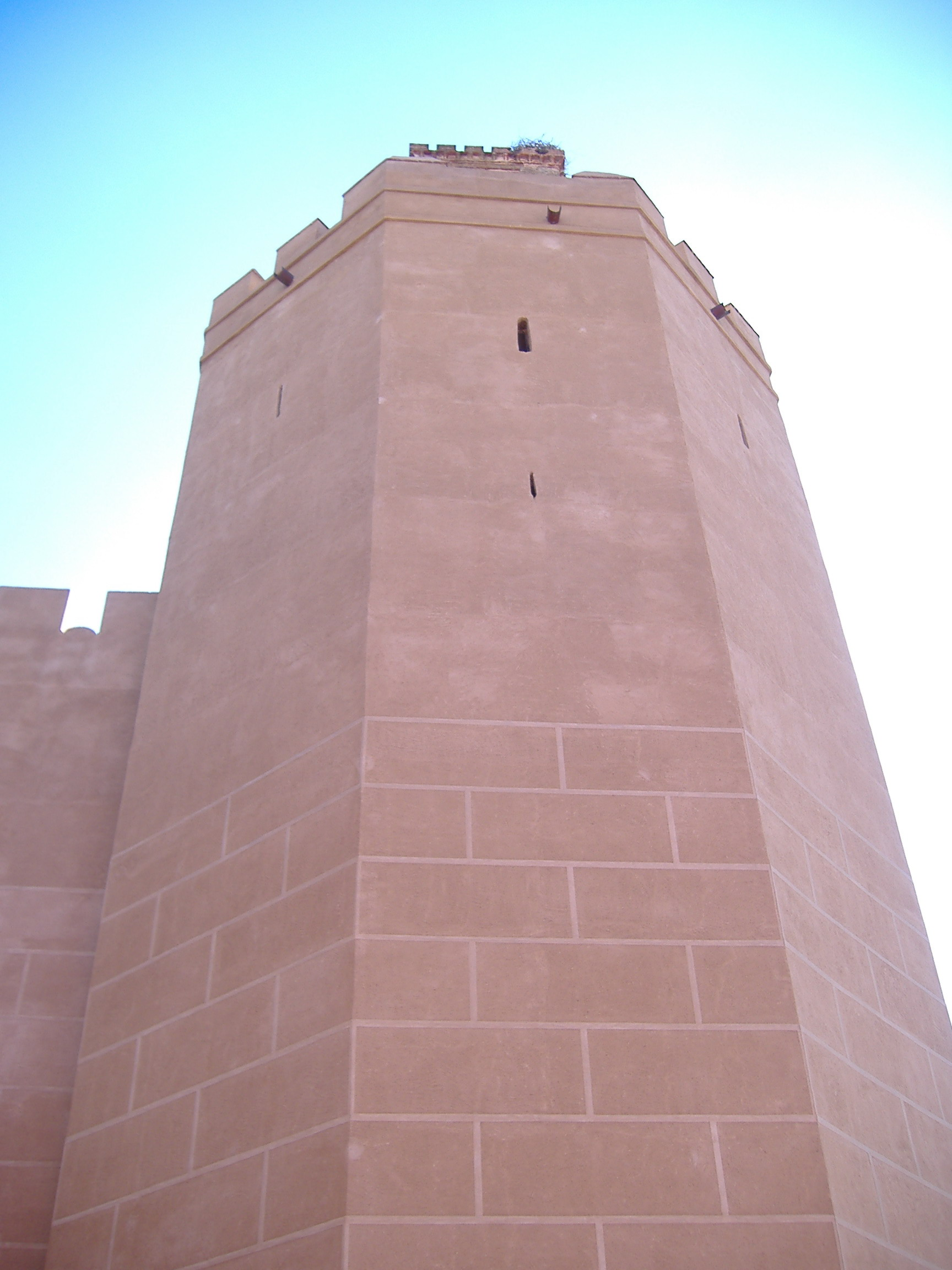 Torre Espantaperros de Badajoz.